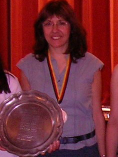 Beate Krum, 2007 in Braunfels bei der Deutschen Frauen-Länder-Mannschaftsmeisterschaft im Schach, die sie zusammen mit den Frauen aus Baden gewann.